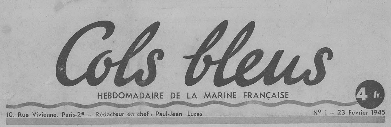 Logo titre du premier numéro du journal Cols bleus de la marine nationale française.